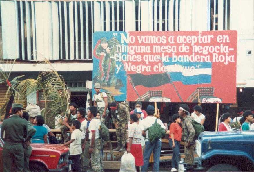 León Nicaragua, América Central , Cartel. 1988 Text of poster: No vamos a aceptar en niguna mesa de negociaciones que la bandera Roja y Negra claudique." Translation: "We will not accept that in any negotiating table the Red and Black flag falters."